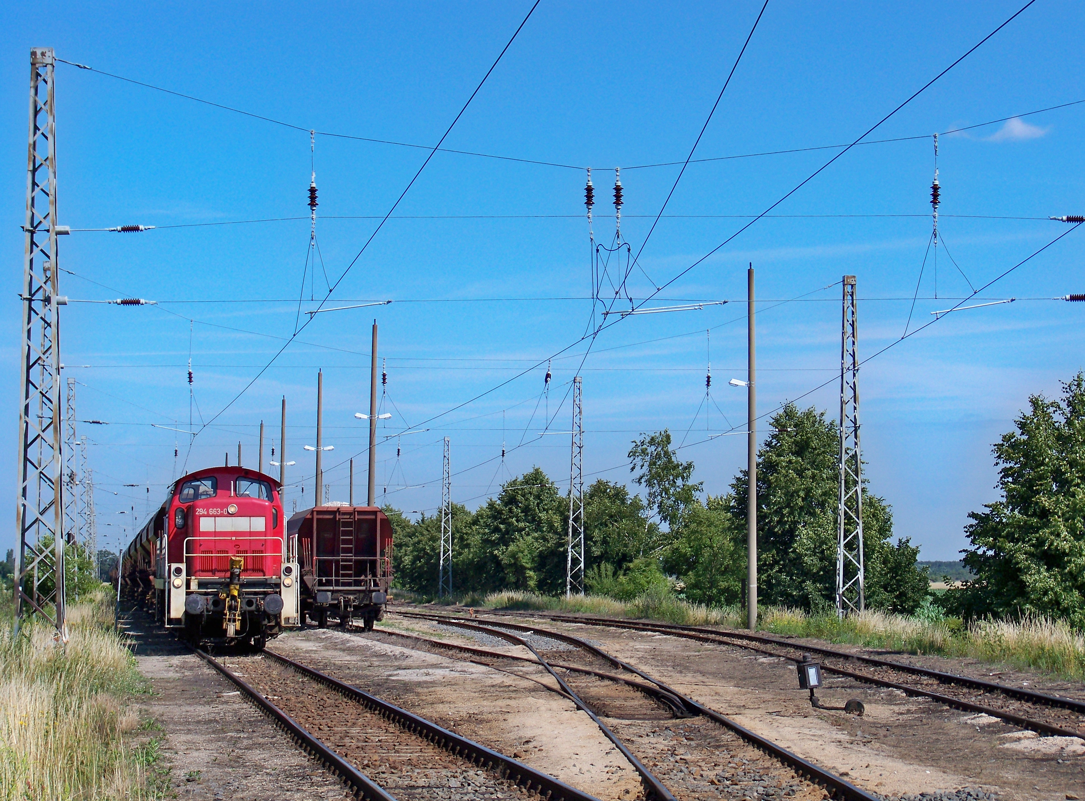 Übergabebahnhof des Kieswerk Sprotta im Nordosten von Eilenburg an der Strecke Lutherstadt Wittenberg–Eilenburg